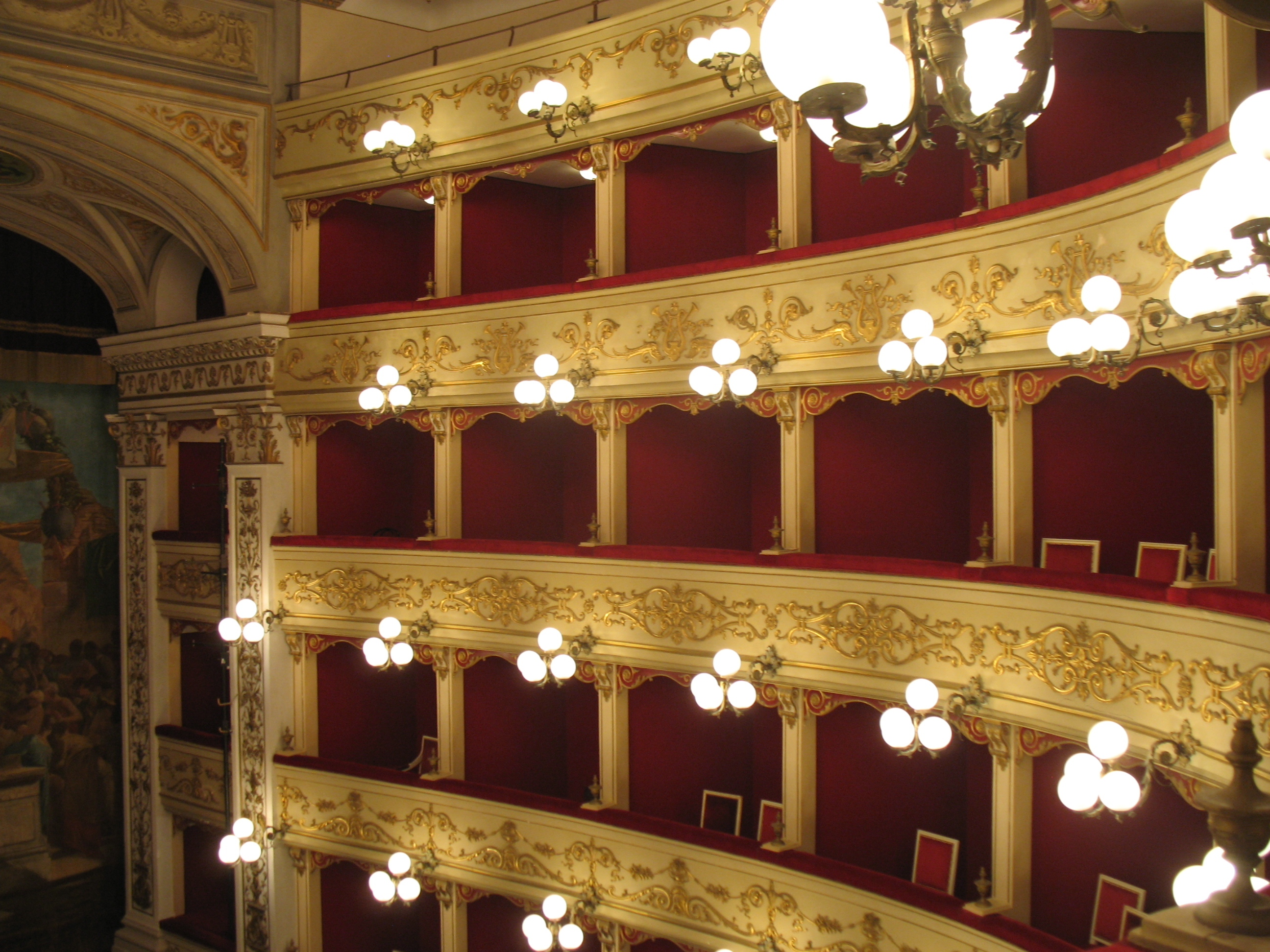 Spalti del Teatro Marrucino